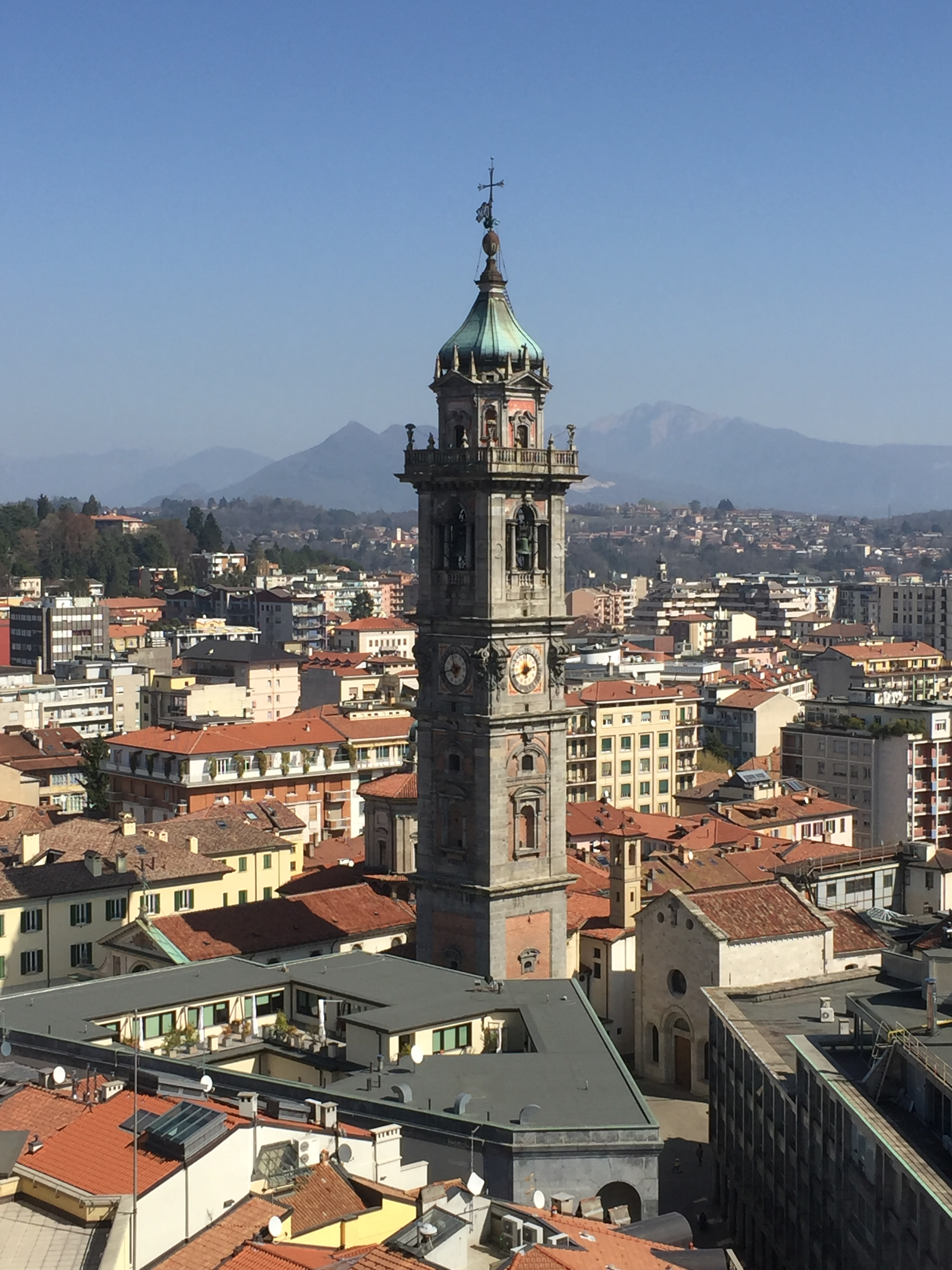 Varese - Campanile della Basilica di S. Vittore - vista dalla torre civica